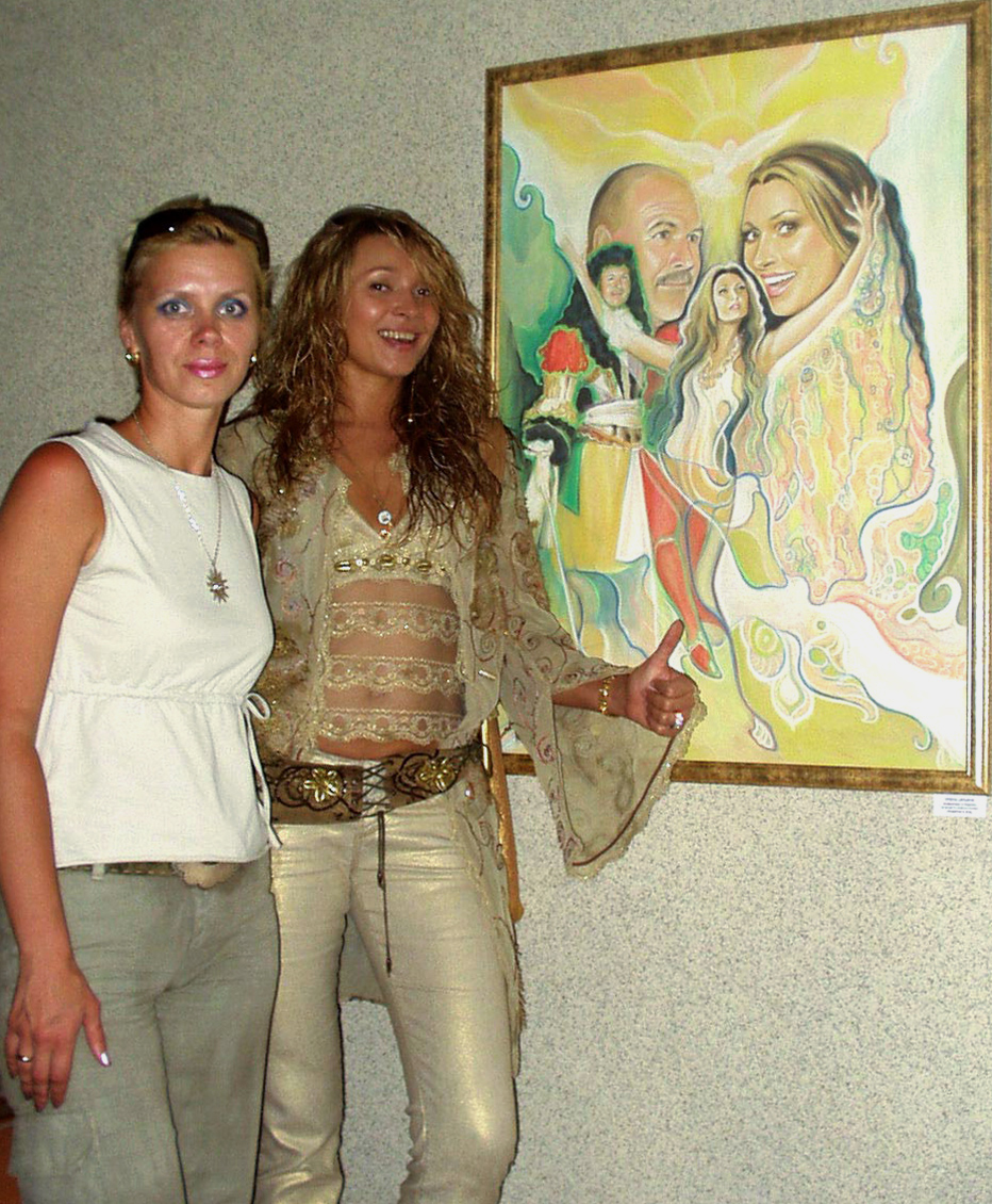 Елена Ильина с певицей Анжеликой Агурбаш. Картина "Анжелика и Король"